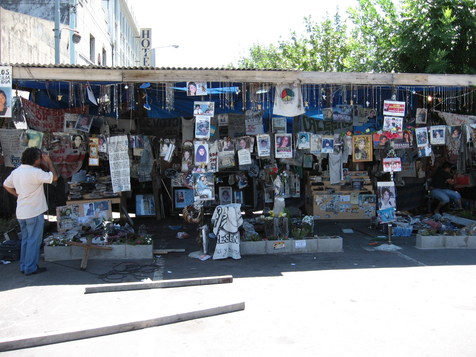 Puesto colocado a metros de República Cromagñon, con fotos de las víctimas del incendio.